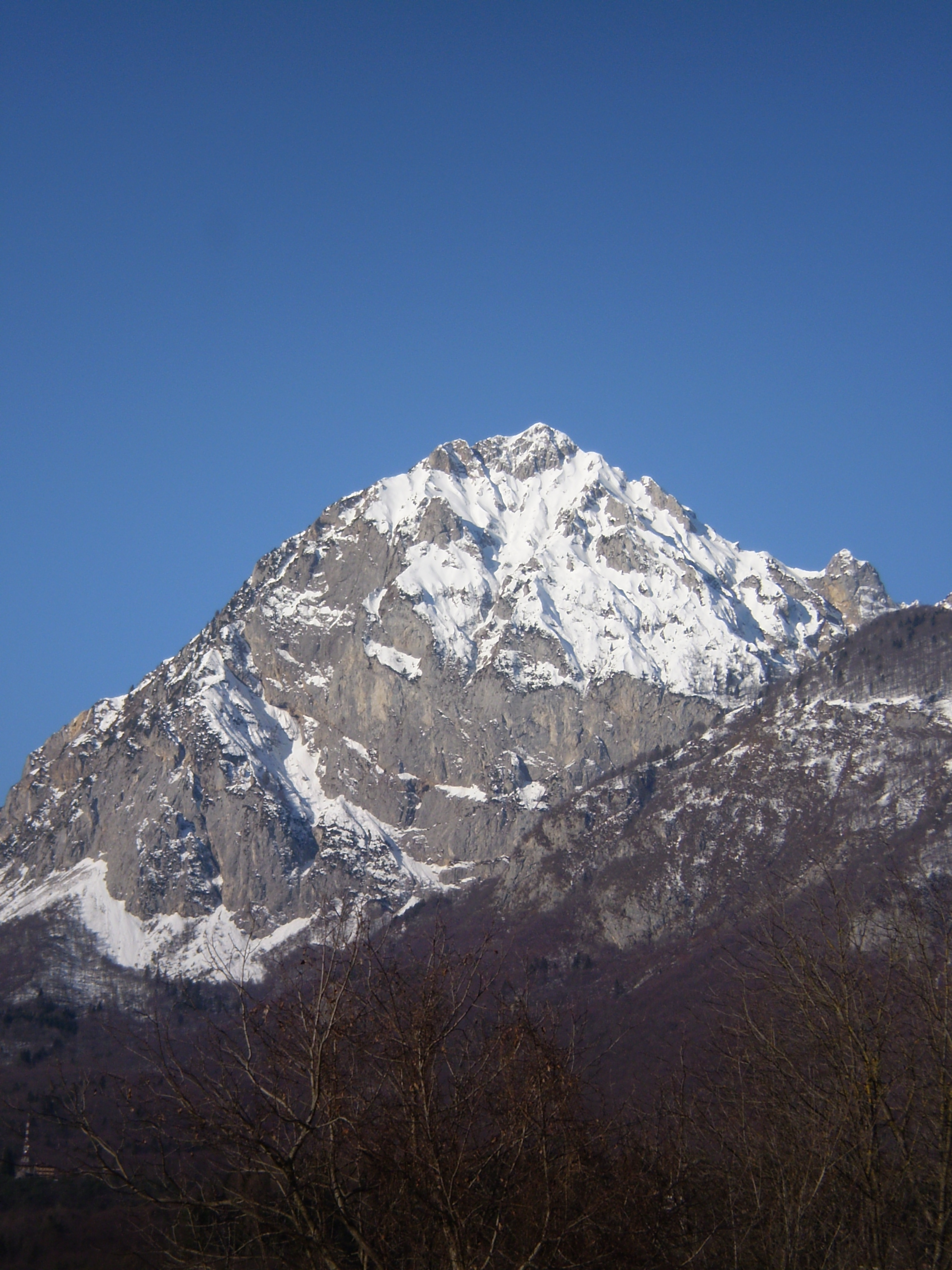 La Tinise viodude di Dimpeç (Cjargne) - La Tinisa vista da Ampezzo (Carnia)